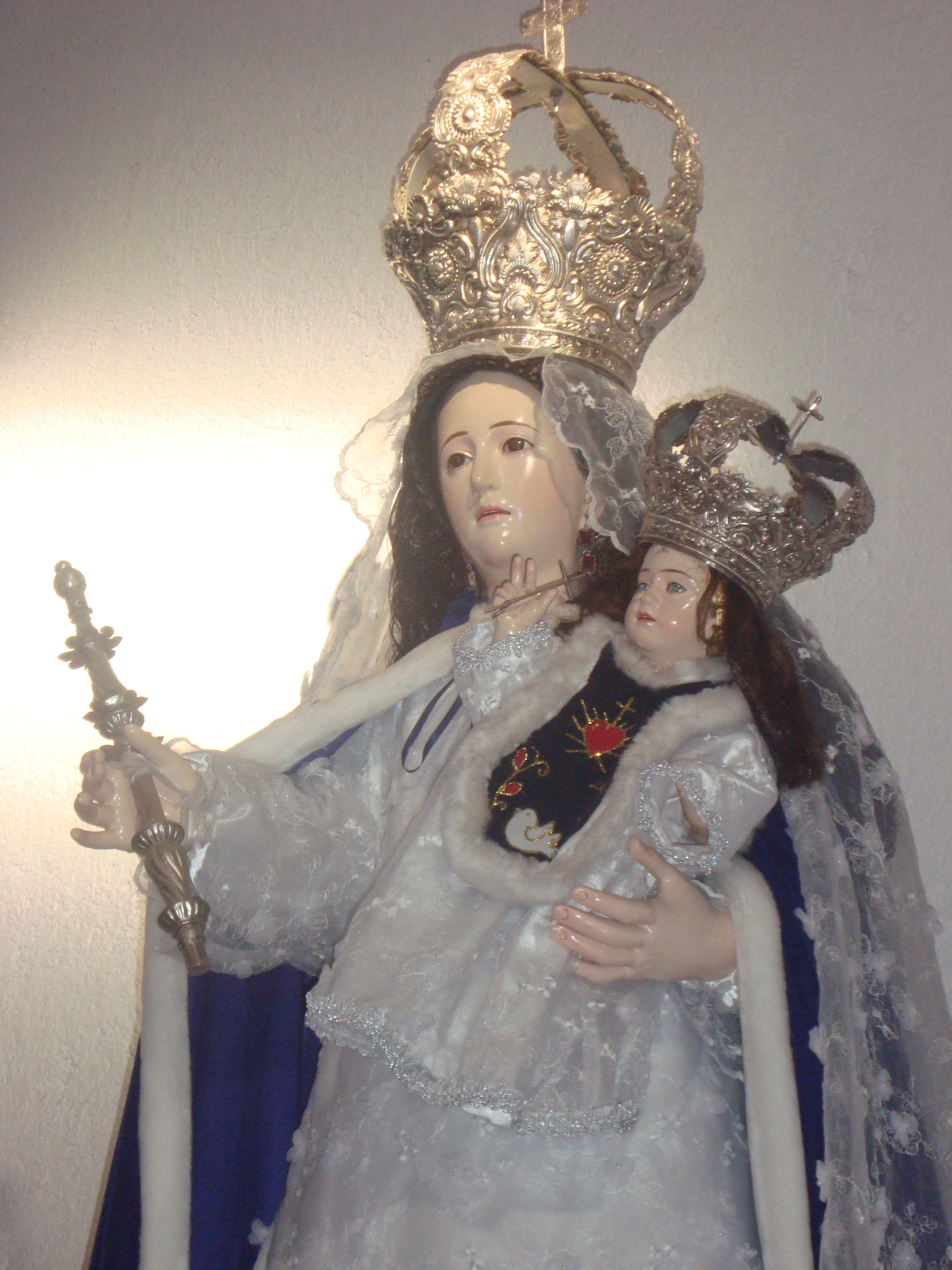 Virgen Maria de la Candelaria, patrona de Alangasí